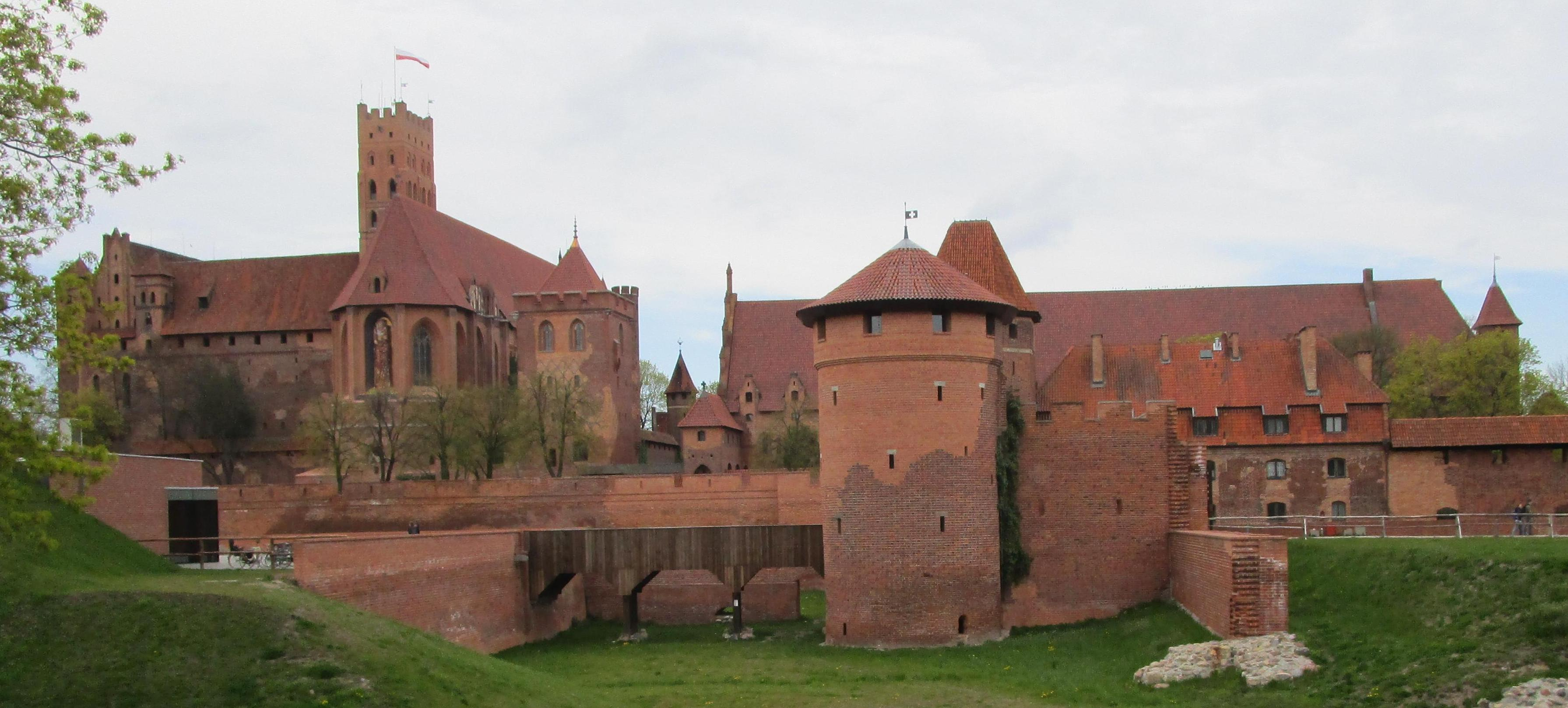 Die Marienburg aus Osten 2016 - Vergleich zum Zerstörungsfoto 1945